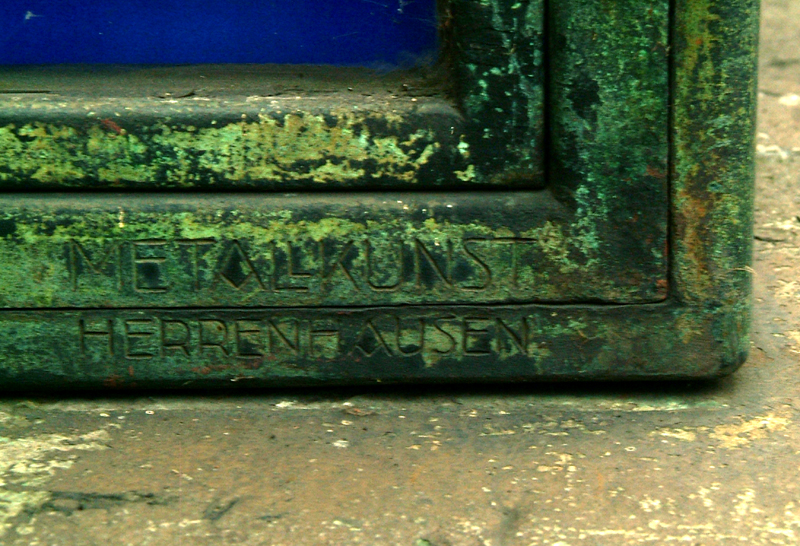 Am Fuß der Falke-Uhr am Thielenplatz in Hannover findet sich über dem Steinsockel die Inschrift mit den Herstellerangaben: "Metallkunst Herrenhausen.